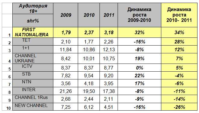 Темпи зростання показників серед основних телеканалів України (2009-2011 рр.)